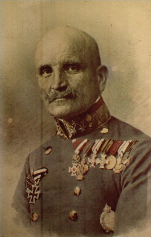 Hrvaški oficir Milan Emil Uzelac v avstroogrski uniformi.